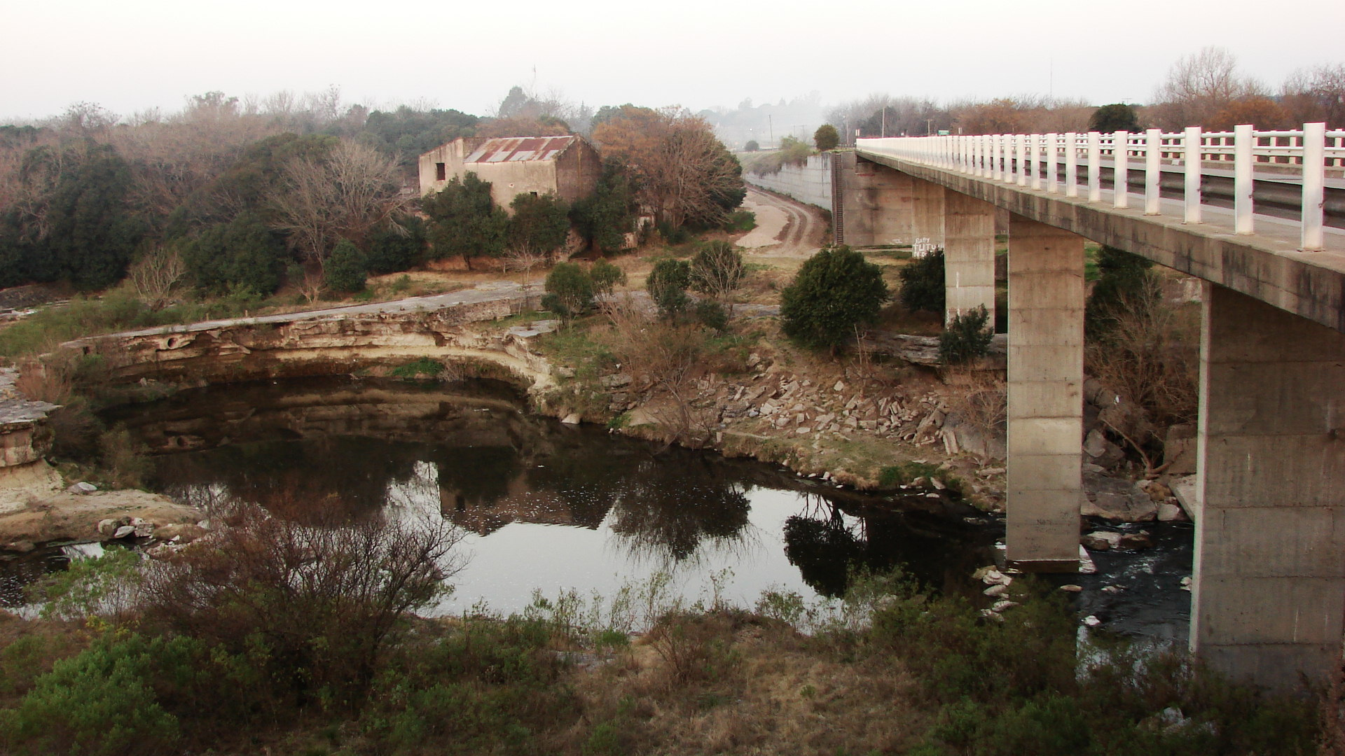 recuerdos